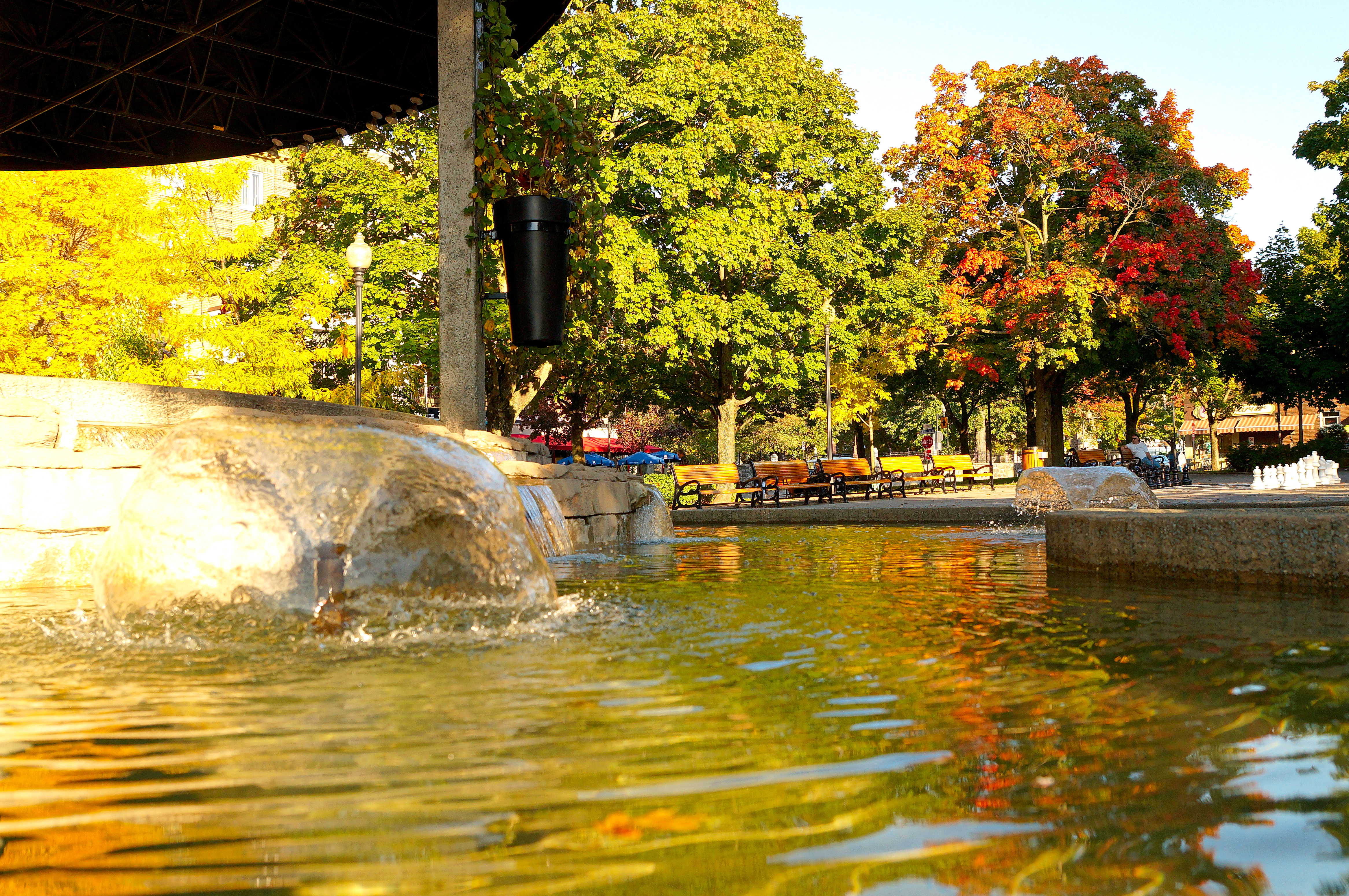 Site du patrimoine du Parc-Saint-Frédéric